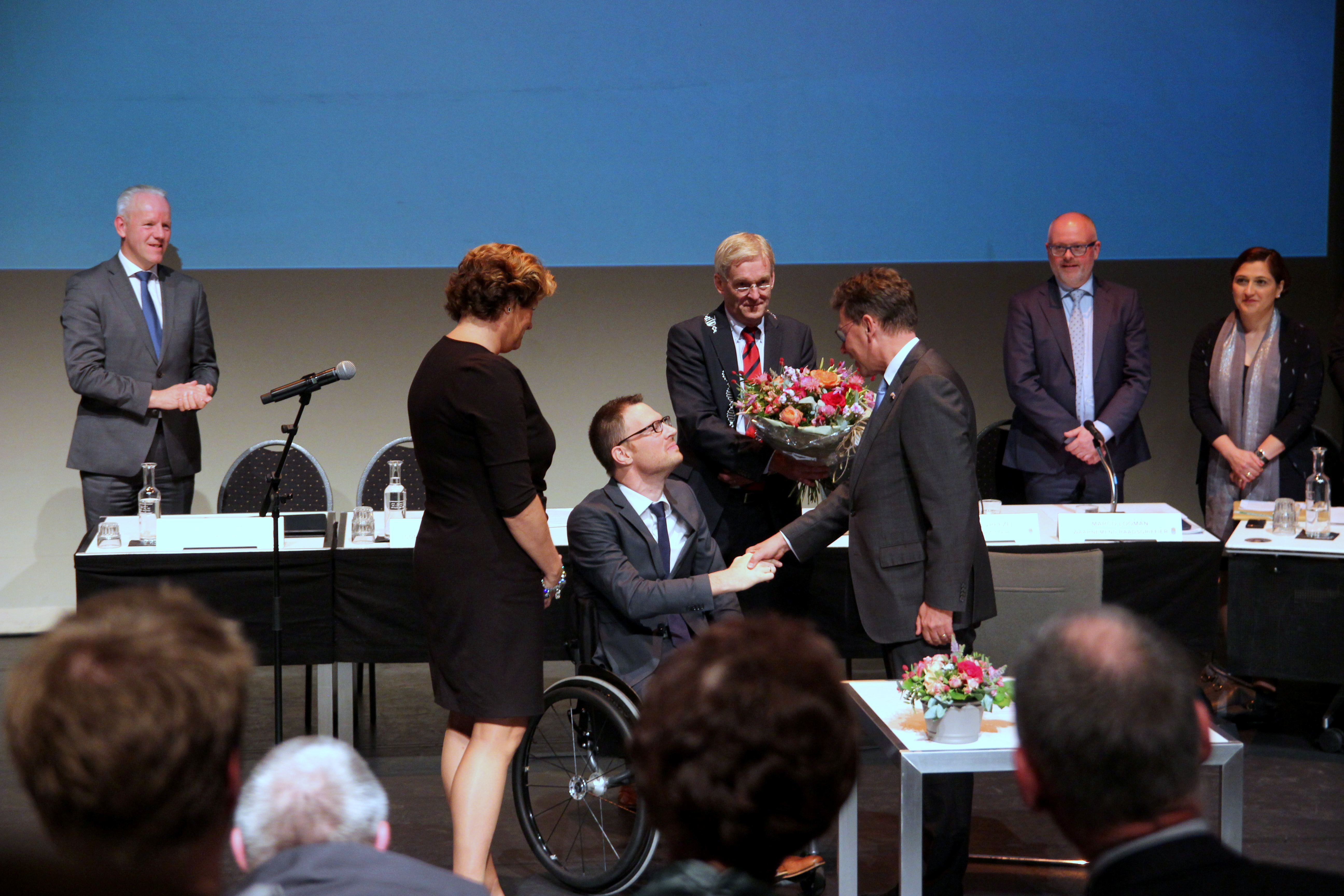 Installatie van Otwin van Dijk als burgemeester van de gemeente Oude IJsselstreek in de theaterzaal van de DRU in Ulft.